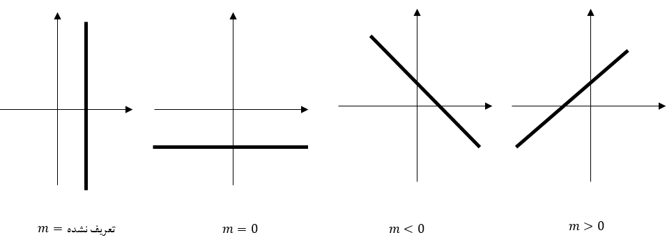 علامت شیب در تصویرهای مختلف